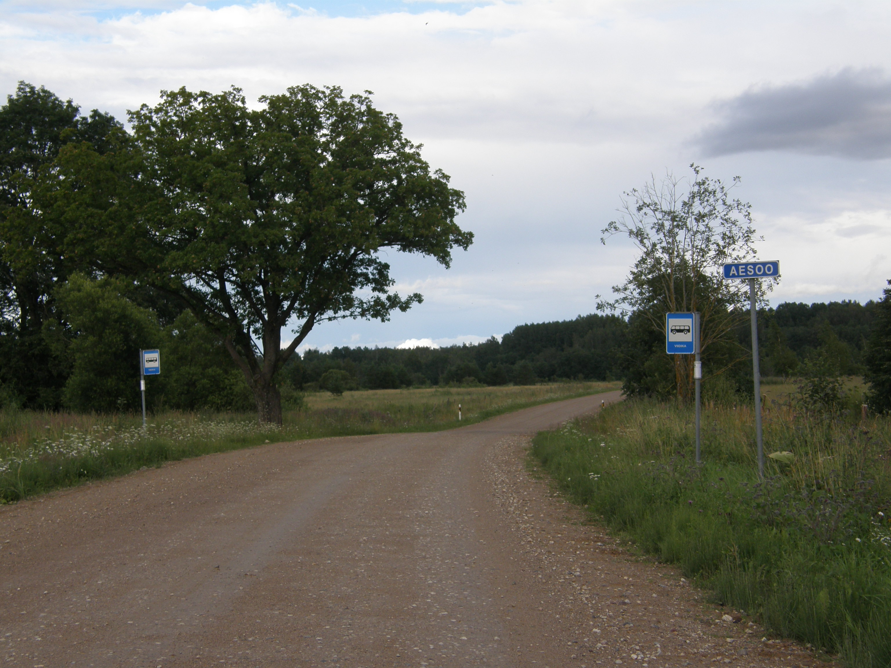 Aesoo küla, Viidika bussipeatus